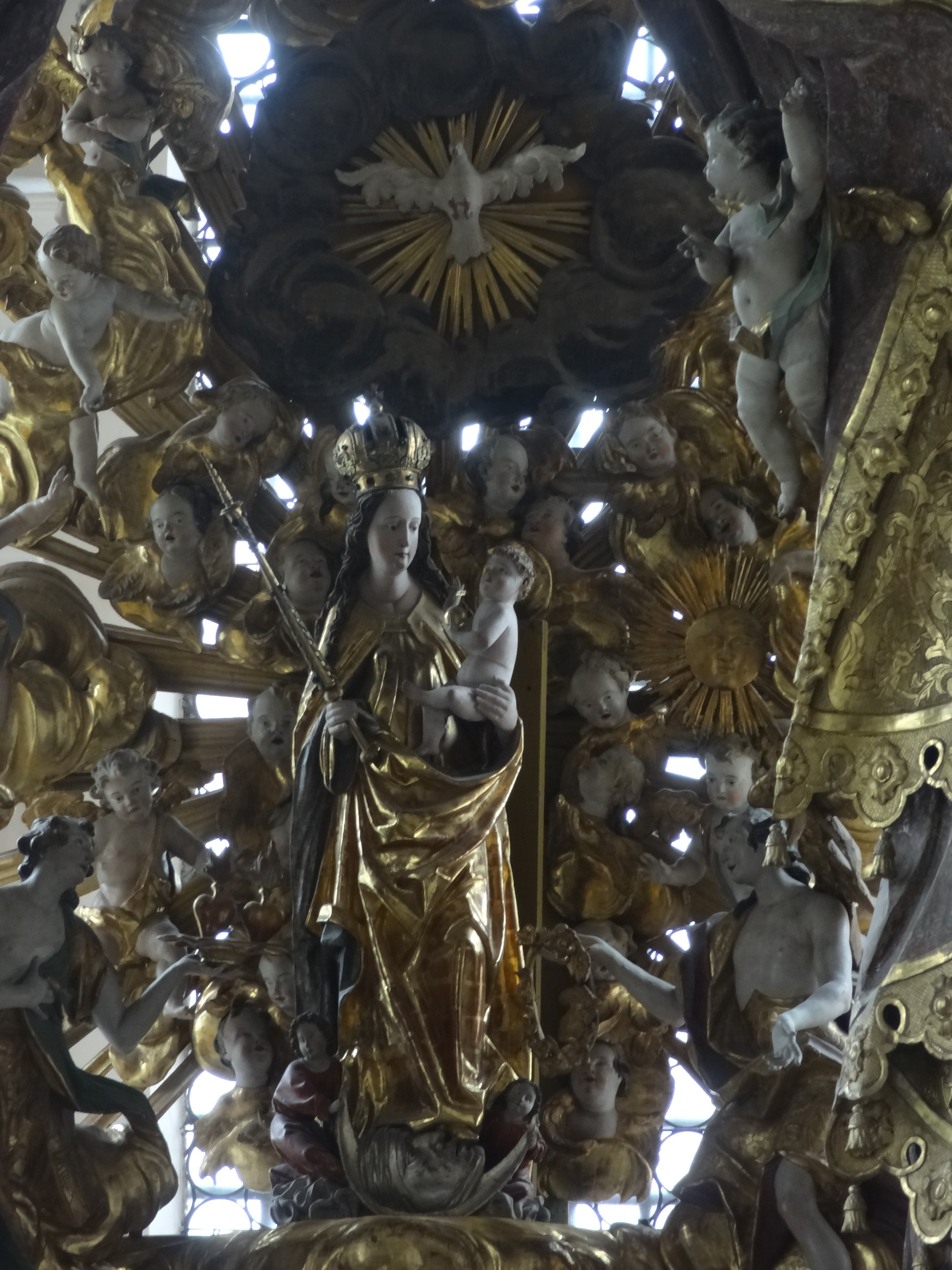 Spätgotisches Gnadenbild am Hochaltar der Wallfahrtskirche Mariä Himmelfahrt in Maria Thalheim (Gde. Fraunberg, Lkr. Erding)